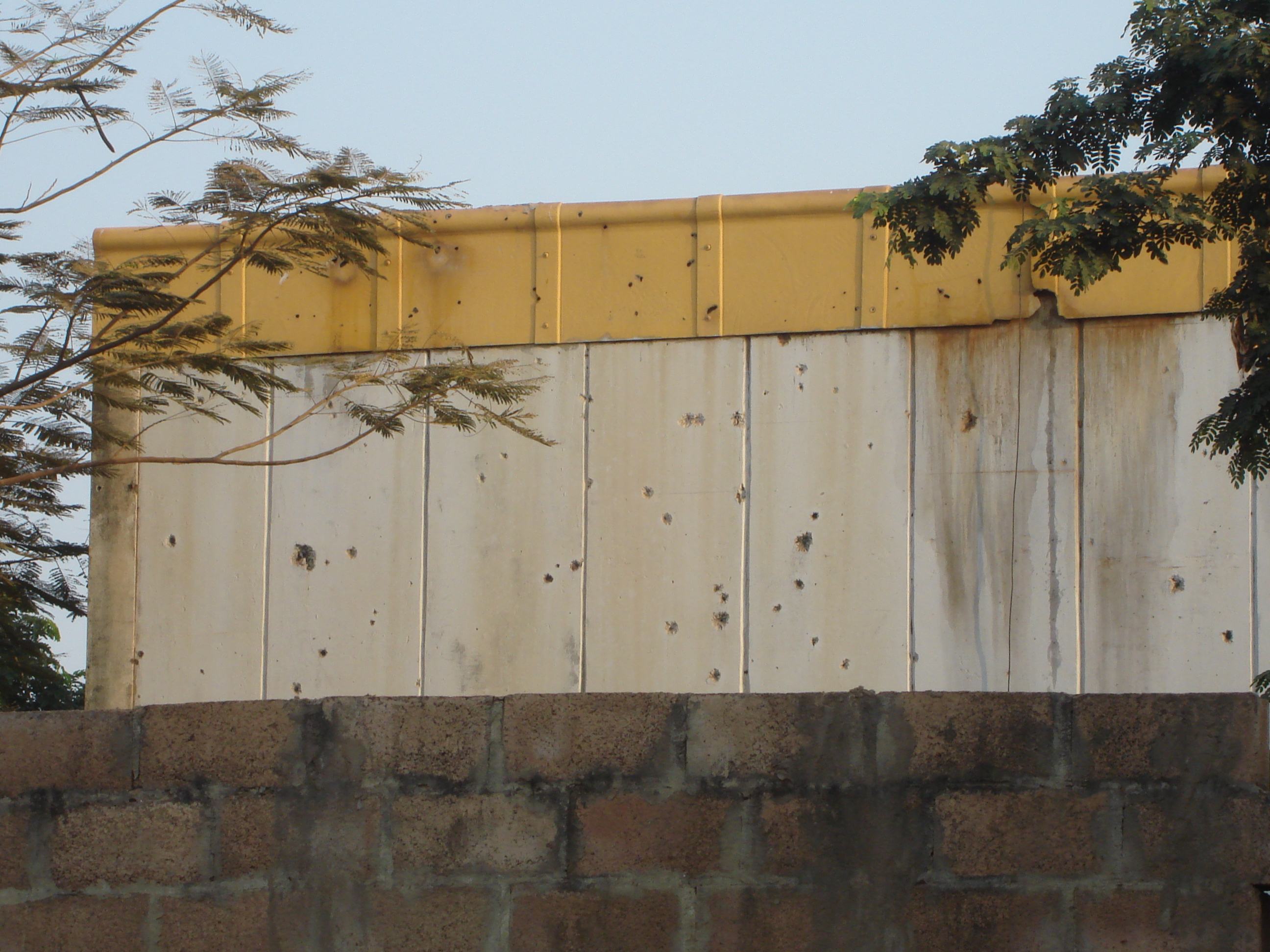 Bullet holes from 98